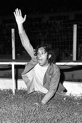 Carlos Bilardo, entrenador de fútbol del Club Estudiantes de La Plata durante 1976.